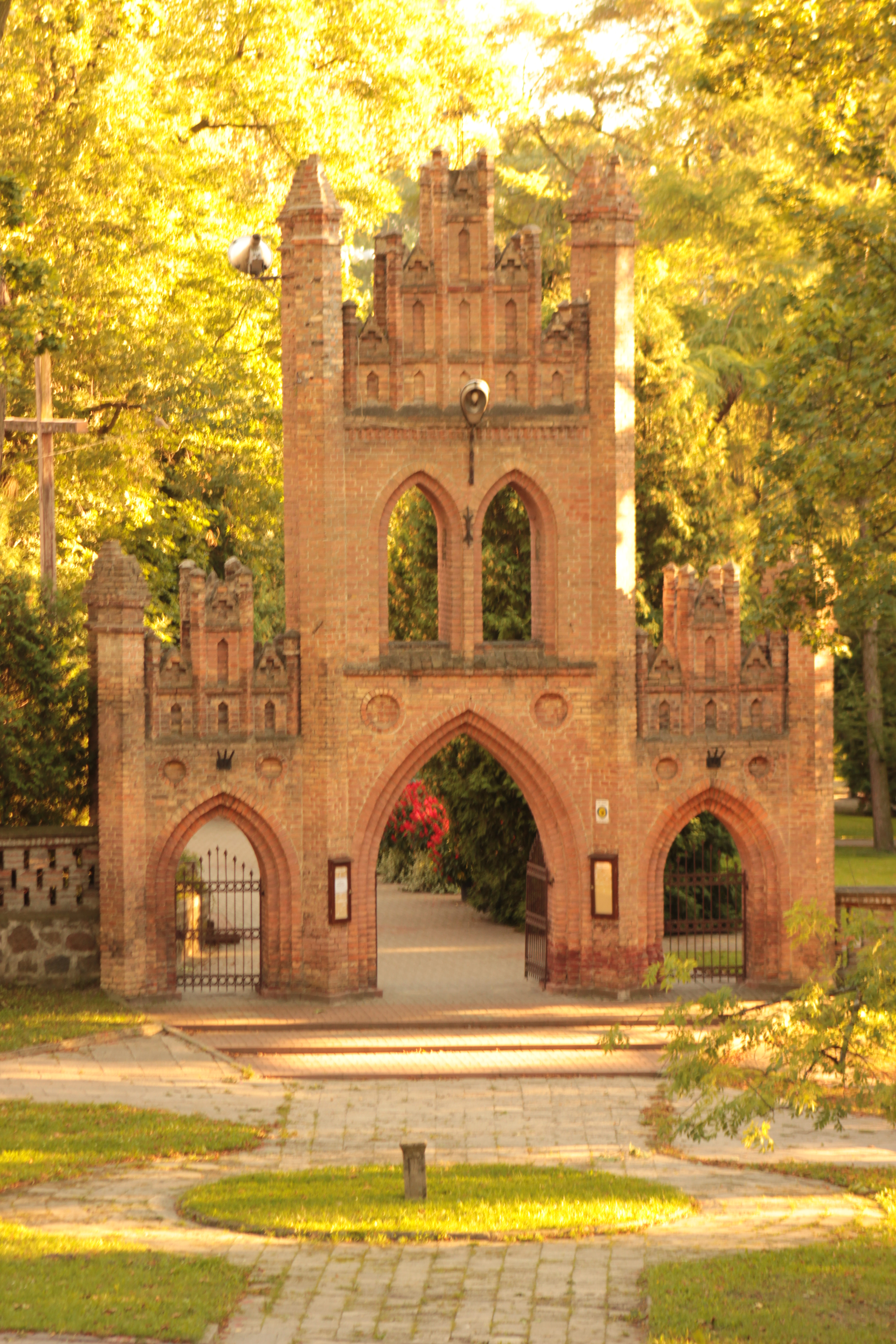 Ciechanów, dzwonnica-brama, z odcinkiem murowanego ogrodzenia, 1900